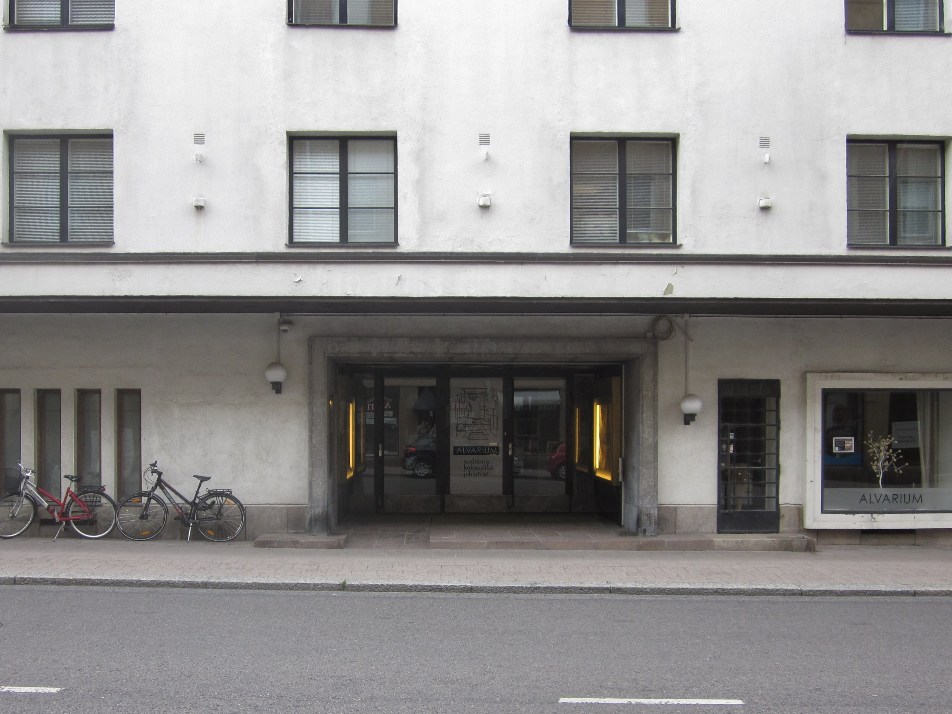 Entisen elokuvateatteri Ritzin sisäänkäynti osoitteessa Puutarhakatu 8. Turku.